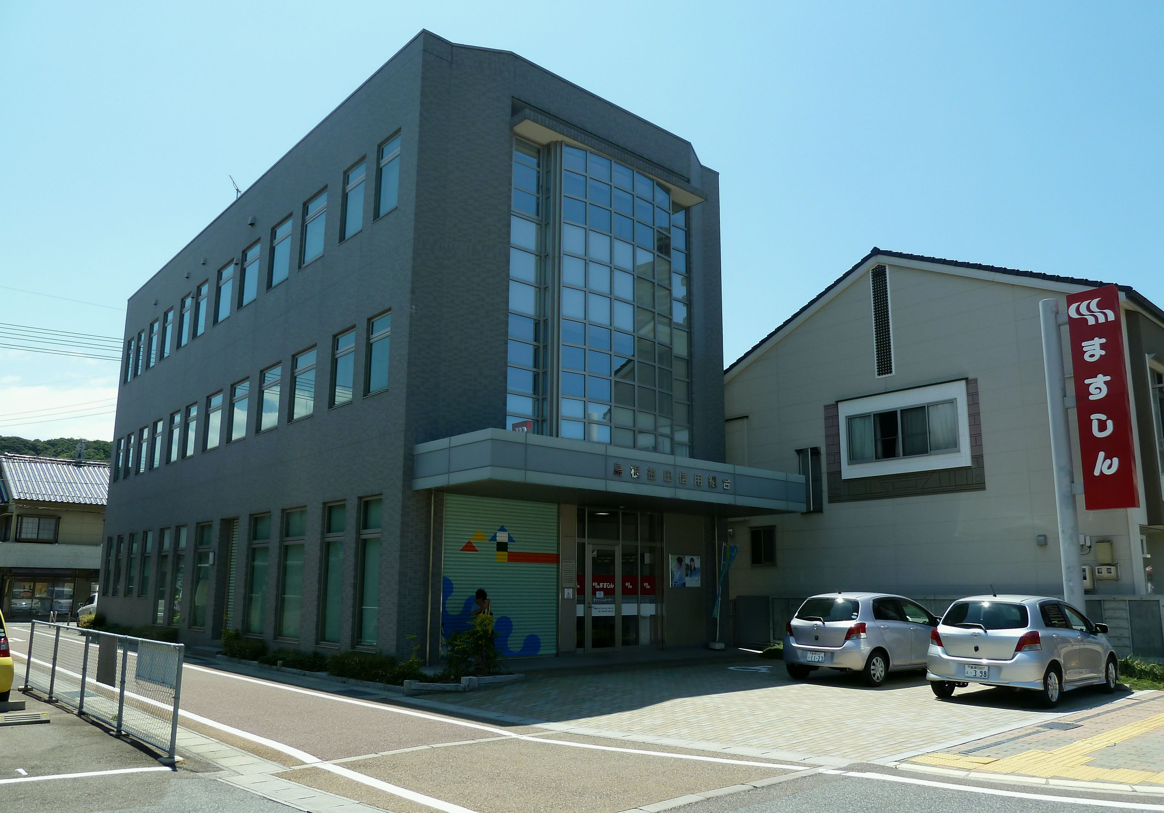 益田信用組合